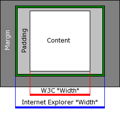 Ilustracja Internet Explorer box model bug